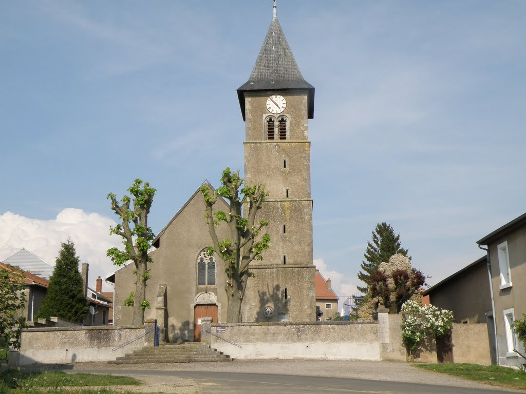 Eglise de Craincourt